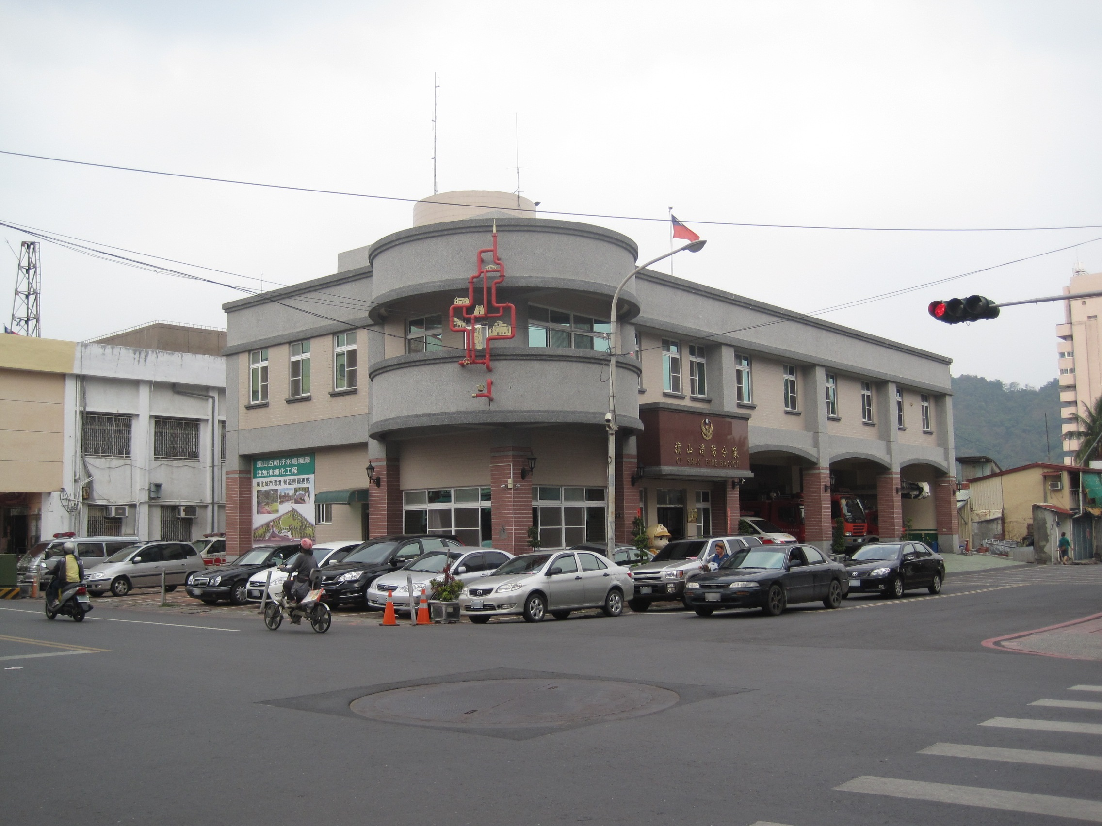 高雄市政府消防局旗山分隊。